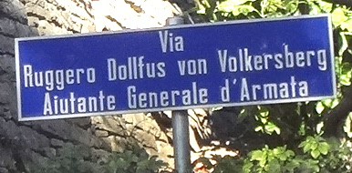 Rue «Ruggero Dollfus von Volkersberg» (Roger Dollfus de Volckersberg, 1876-1948), politicien suisse.